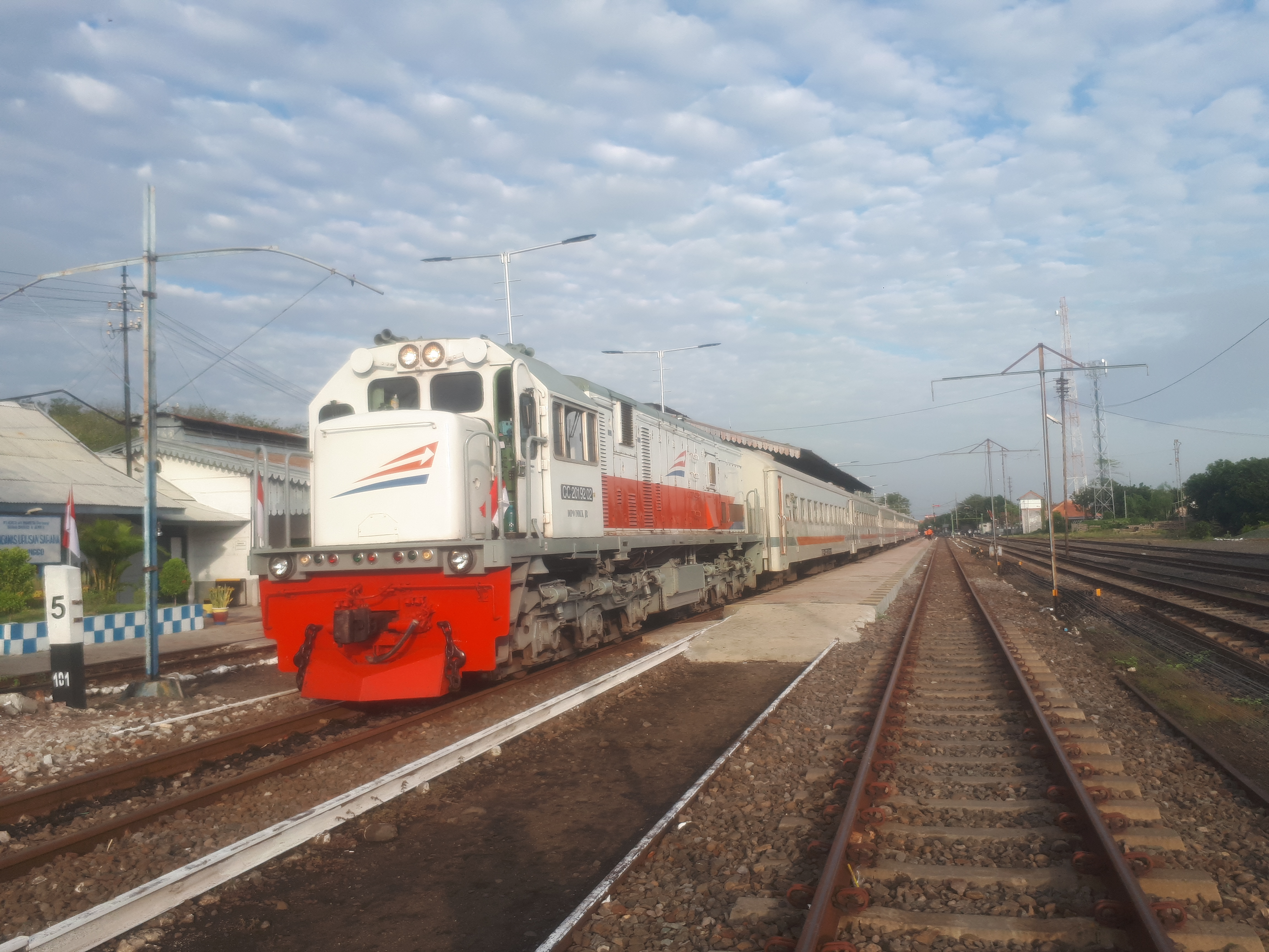 Kereta api Probowangi jurusan Banyuwangi saat berada di Stasiun Probolinggo, 2020